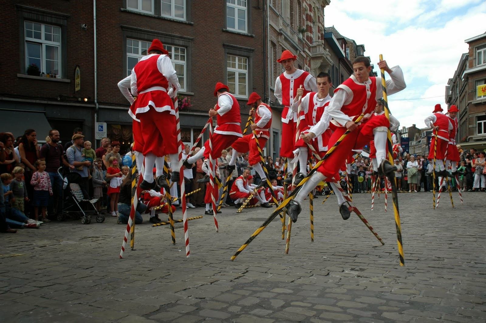 Joutes sur échasses - Echasseurs namurois